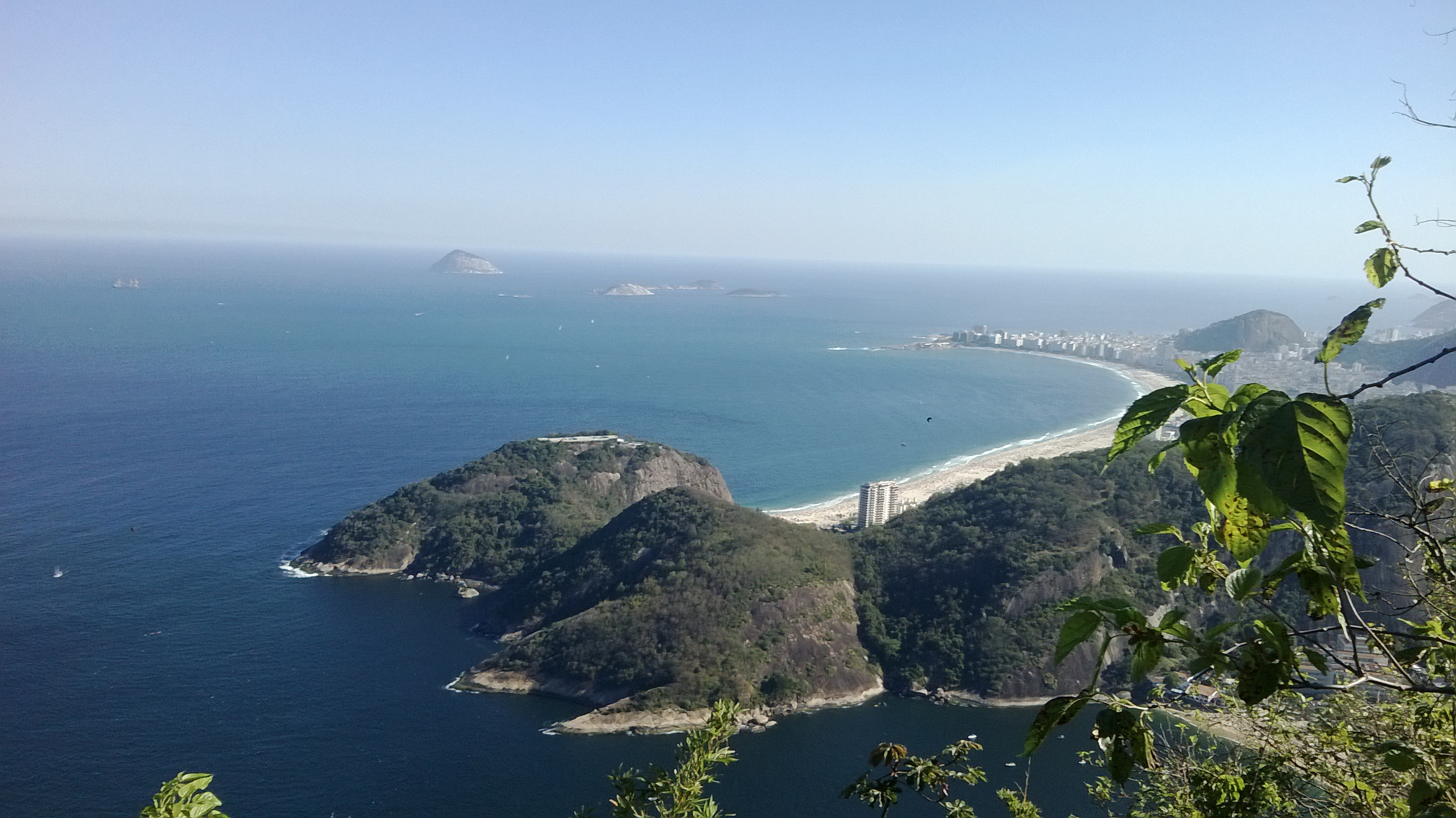 Foto mostra a magia do Atlântico e o encanto do Morro da Babilônia, que ao seu fundo evidencia as orlas das praias mais belas do Rio de Janeiro.